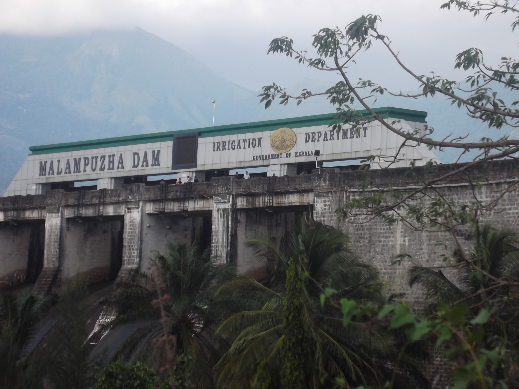 പാലക്കാട് ജില്ലയിൽ പാലക്കാടിനു സമീപം മലമ്പുഴയിൽ ഭാരതപ്പുഴയുടെ ഒരു പ്രധാന പോഷകനദിയായ കൽപ്പാത്തിപ്പുഴയുടെ കൈവഴിയായ മലമ്പുഴ നദിയ്ക്കു കുറുകെ തീര്‍ത്ത അണക്കെട്ടാണ് മലമ്പുഴ ഡാം.